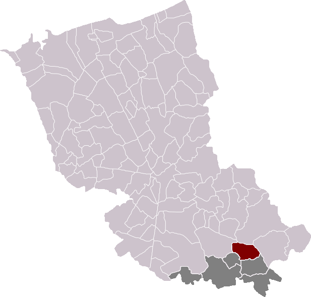 Locatie gemeente Zoeterstee in arrondissement Duinkerke. Zelfgemaakt. Location of Le Doulieu municipality in the arrondissement of Dunkirk. Self made. Localisation de la commune du Doulieu dans l'arrondissement de Dunkerque. Fait moi-même.